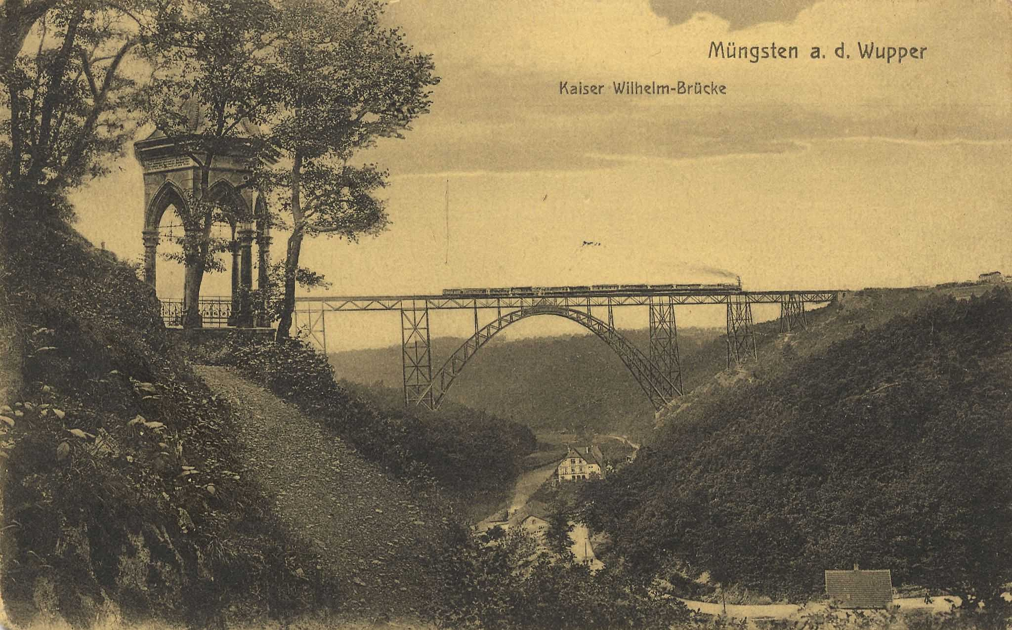 Kaiser-Wilhelm-Brücke, heute Müngstener Brücke zwischen den deutschen Städten Remscheid und Solingen